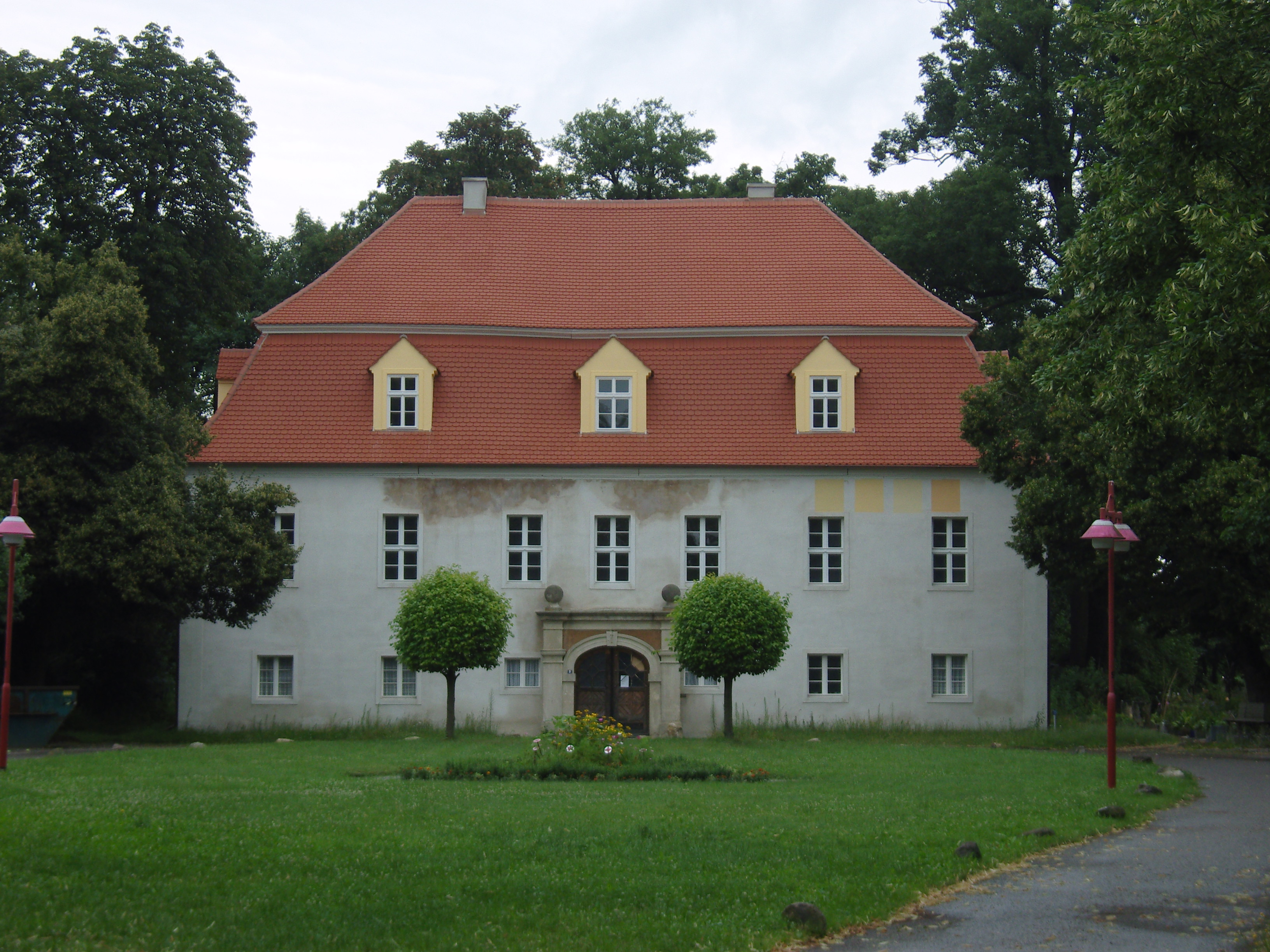 Gutshaus in Schwarzbach im Landkreis Oberspreewald-Lausitz